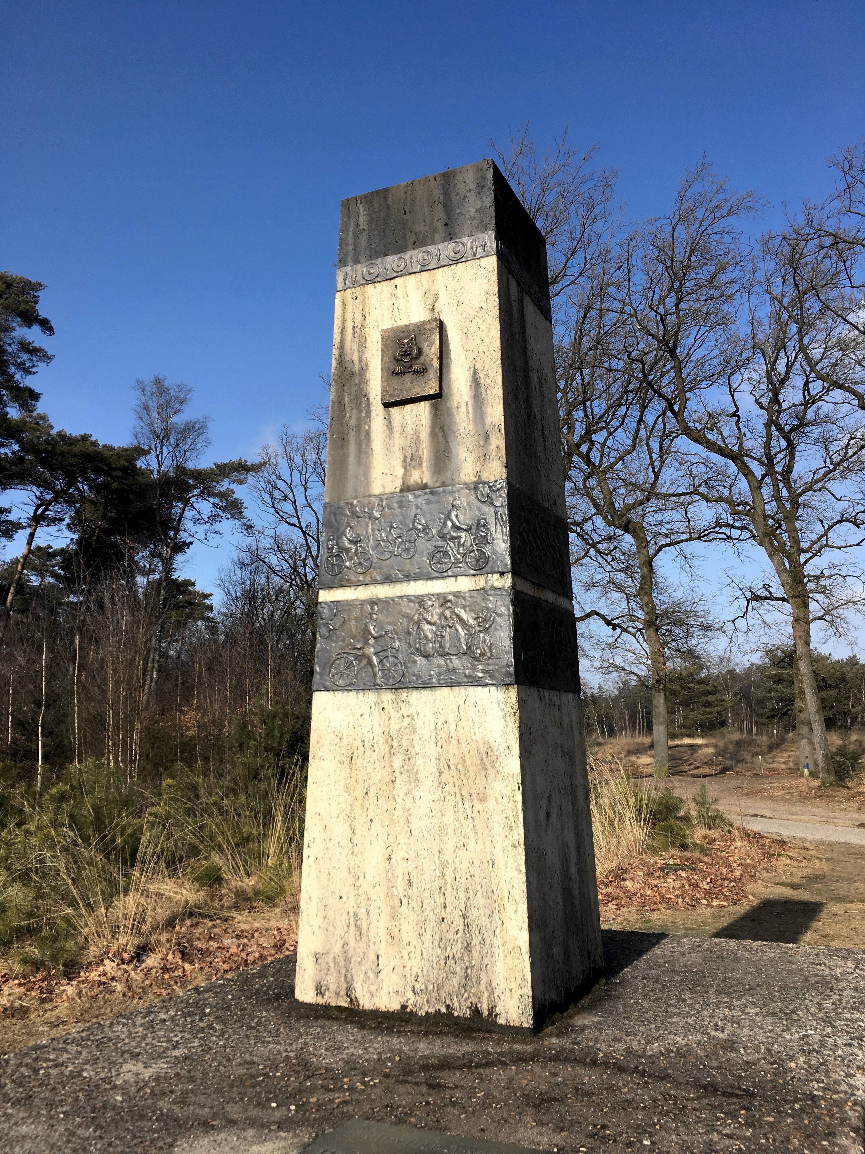 Monument als dank voor de activiteiten van Rijwielpadvereniging Utrecht Met Omstreken, vervaardigd door kunstenaar Theo van de Vathorst in opdracht van de provincie Utrecht. Het monument staat in de boswachterij Austerlitz te Zeist.